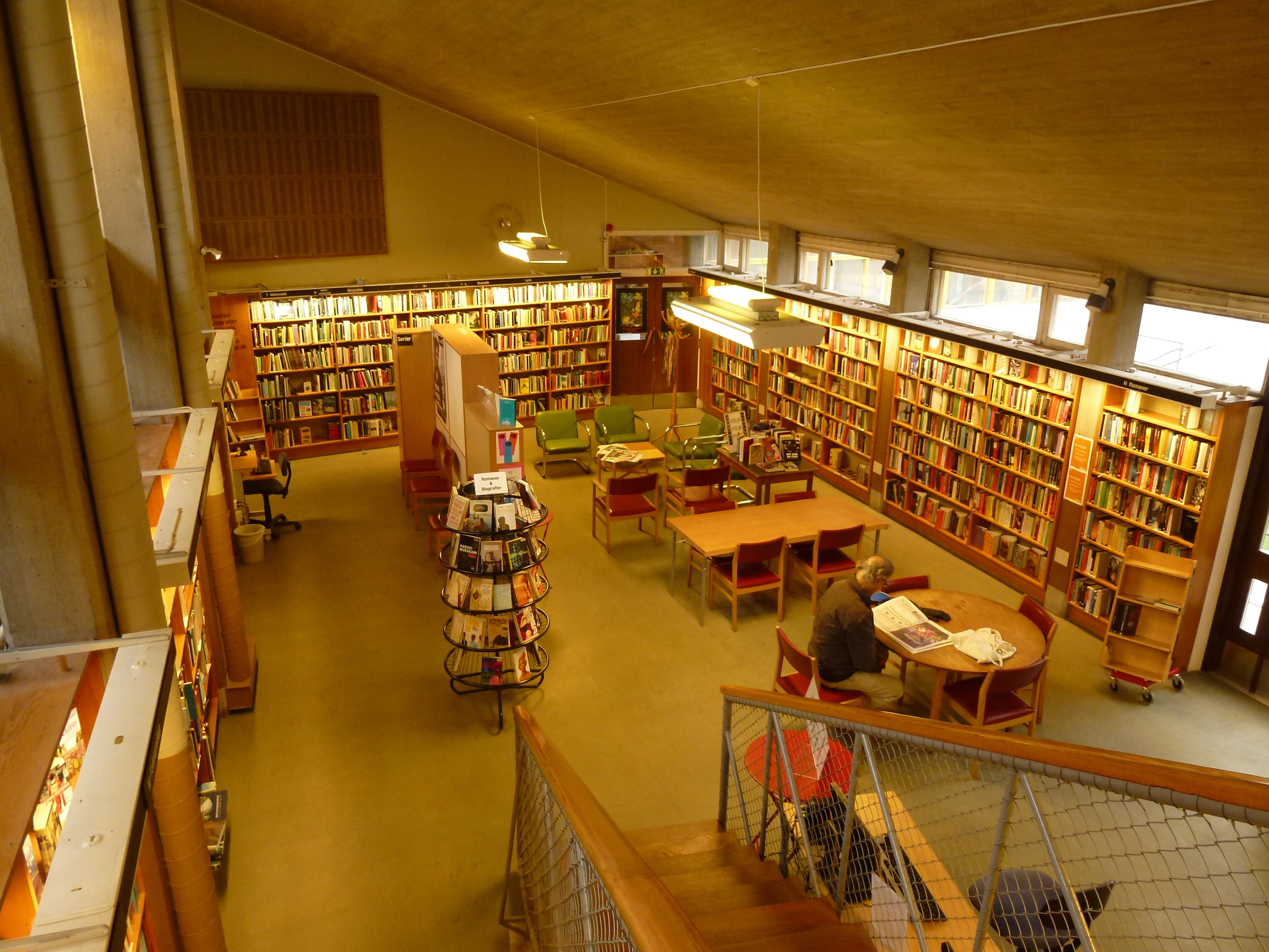 Årsta centrum bibliotek